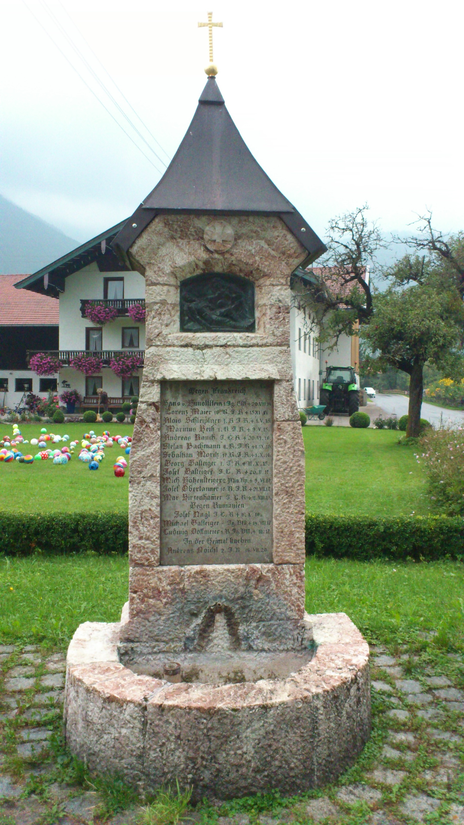 Martersäule aus Rotmarmor, wohl 17. Jahrhundert; an der Kreuzung dreier AltwegeThis is a photograph of an architectural monument.